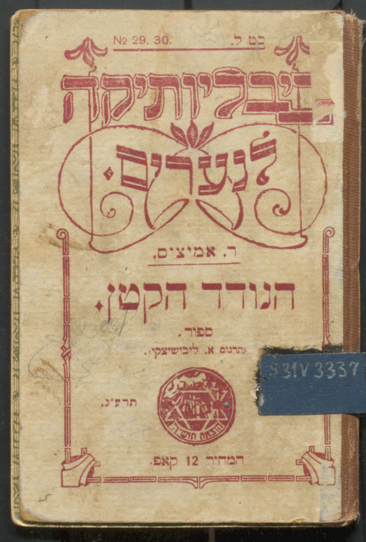 ספר הלב, התרגום הראשון לעברית, "הנודד הקטן", "תושיה": סדרת חוברות "לבני הנעורים", תרגם א', לובושיצקי, פיאטרקוב, 1899 (הספר פורסם שוב בסדרה "ביביליותיקה לנערים" ורשה, 1913)